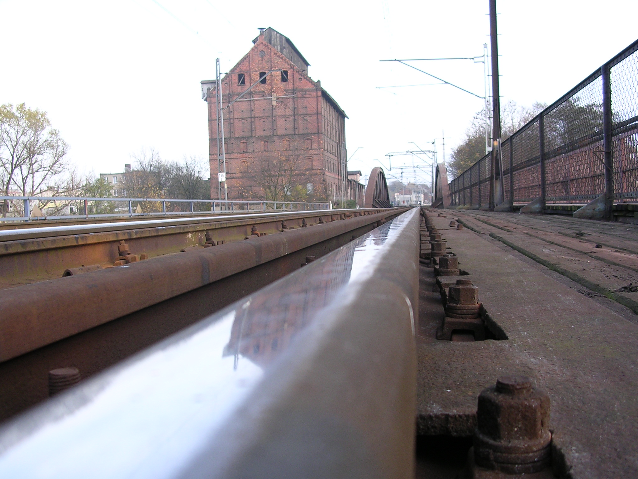 Most na Warcie w Poznaniu (Dębiński)